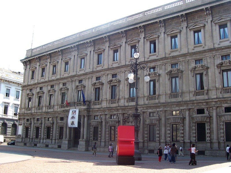 Palazzo Marino a Milano (Municipio)